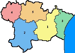 Carte des pays du département de l'Aude